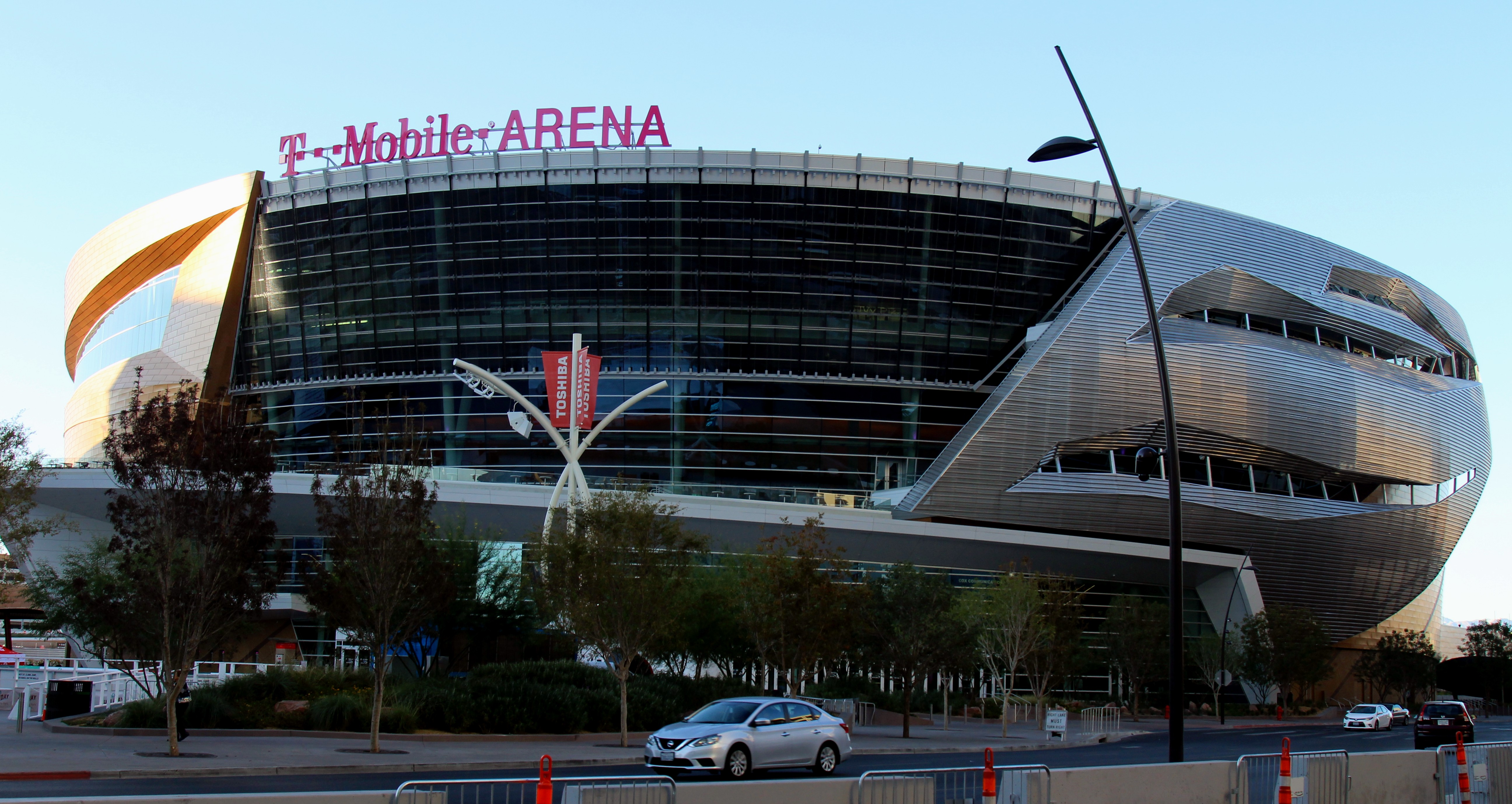 Las Vegas, Nevada Open December 2016